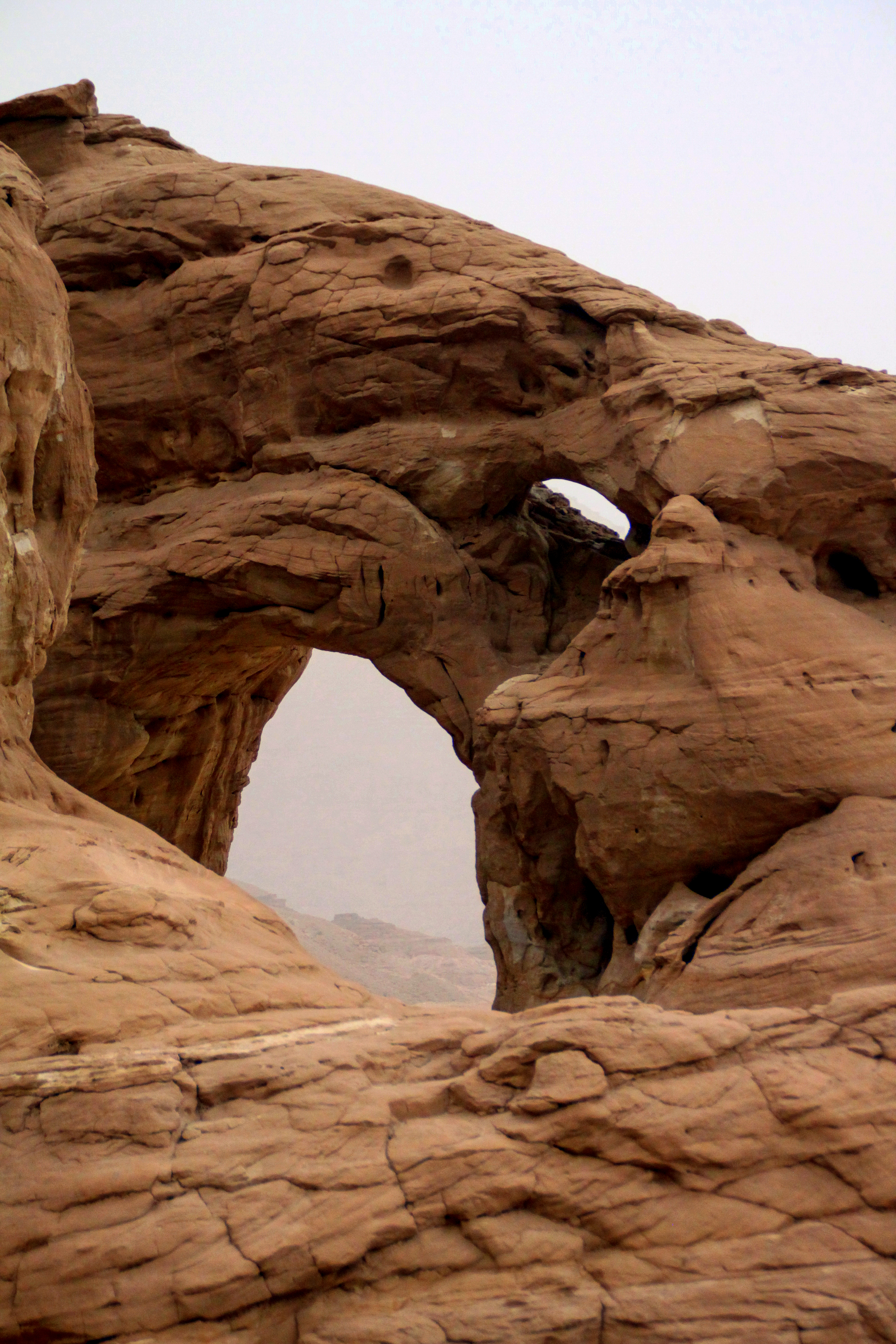 בקעת תִּמְנָע היא בקעה בשוליים המערביים של הערבה הדרומית, כ-25 קילומטר מצפון לאילת. הבקעה, שלהּ צורת פרסה, משתרעת על פני שטח של כ-60 קילומטר רבוע, ותחומה במצוקים תלולים משלושת צדדיה. היא מנוקזת על ידי נחל תמנע בצפון ונחל נחושתן בדרום, הזורמים לערבה שממזרח לה. במרכזהּ מתרומם הר תמנע לגובה של 453 מטרים. באזור שורר אקלים מדברי קיצוני. האדם נמשך לבקעת תמנע החל בתקופה הנאוליתית, בערך 10,000 לפנה"ס ואילך, בשל עפרות הנחושת המצויות בה.